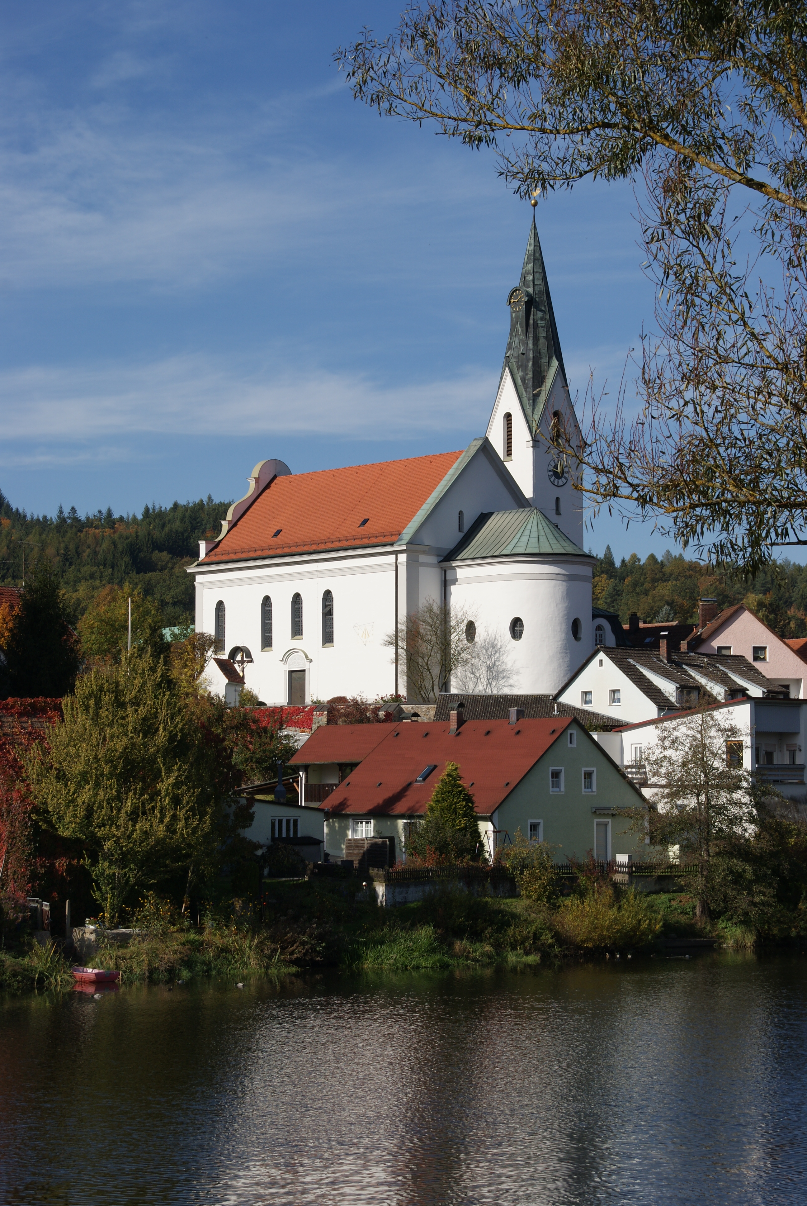 Kath. Pfarrkirche St. Laurentius, Saalbau mit eingezogenem Chor, Flankenturm und Schweifgiebelfassade, neuklassizistisch, 1903/04 von Heinrich Hauberrisser und Joseph Koch, Turm spätgotisch; mit Ausstattung; Reste der Friedhofsmauer, auf der Südseite mit Strebepfeilern, Bruchstein, 17./18. Jahrhundert.